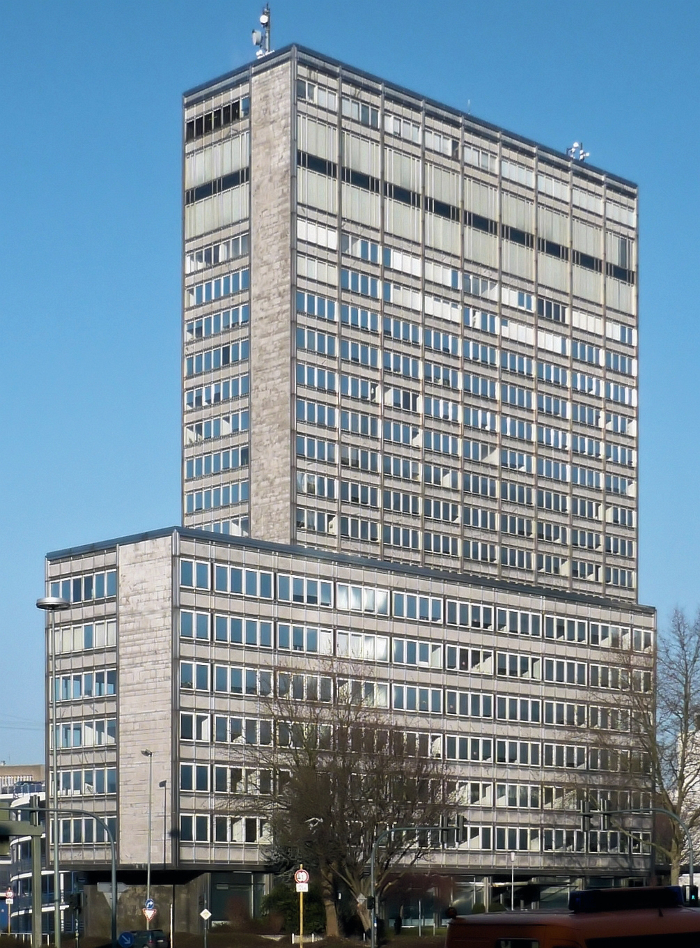 Thyssenhaus, Essen This is a photograph of an architectural monument.